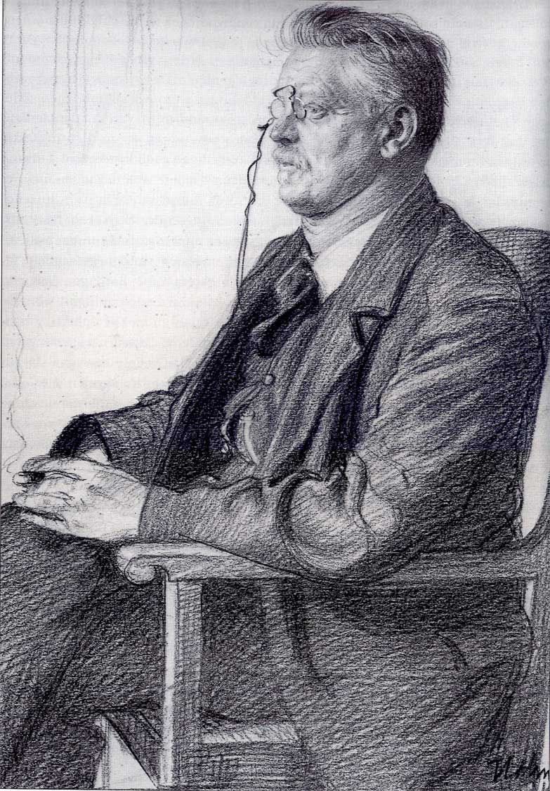 Adrien Henri Gerhard getekend door Albert Hahn sr.